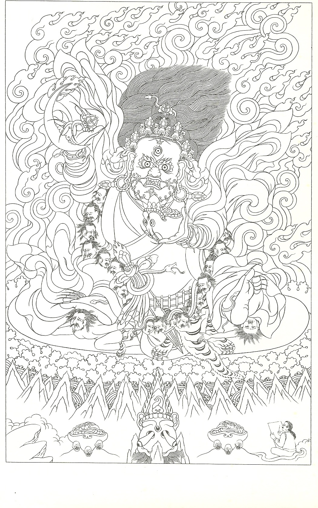 Mahakala: Dharmapala, guardian del Budismo Tibetano